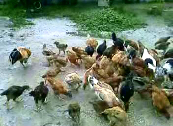 ayam kampung.